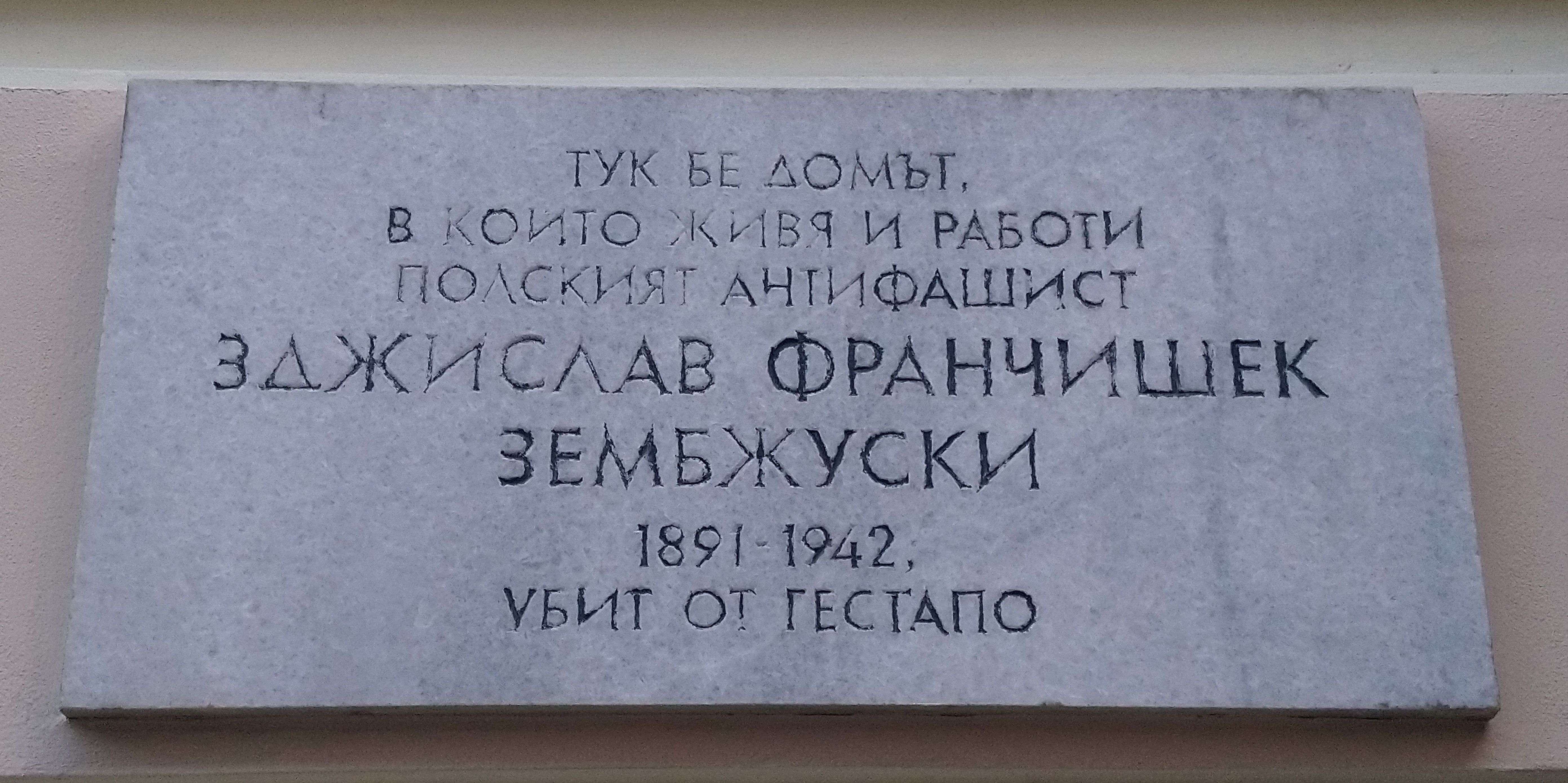 Паметна плоча на писателя Зджислав Зембжуски, ул. Г. С. Раковски, София